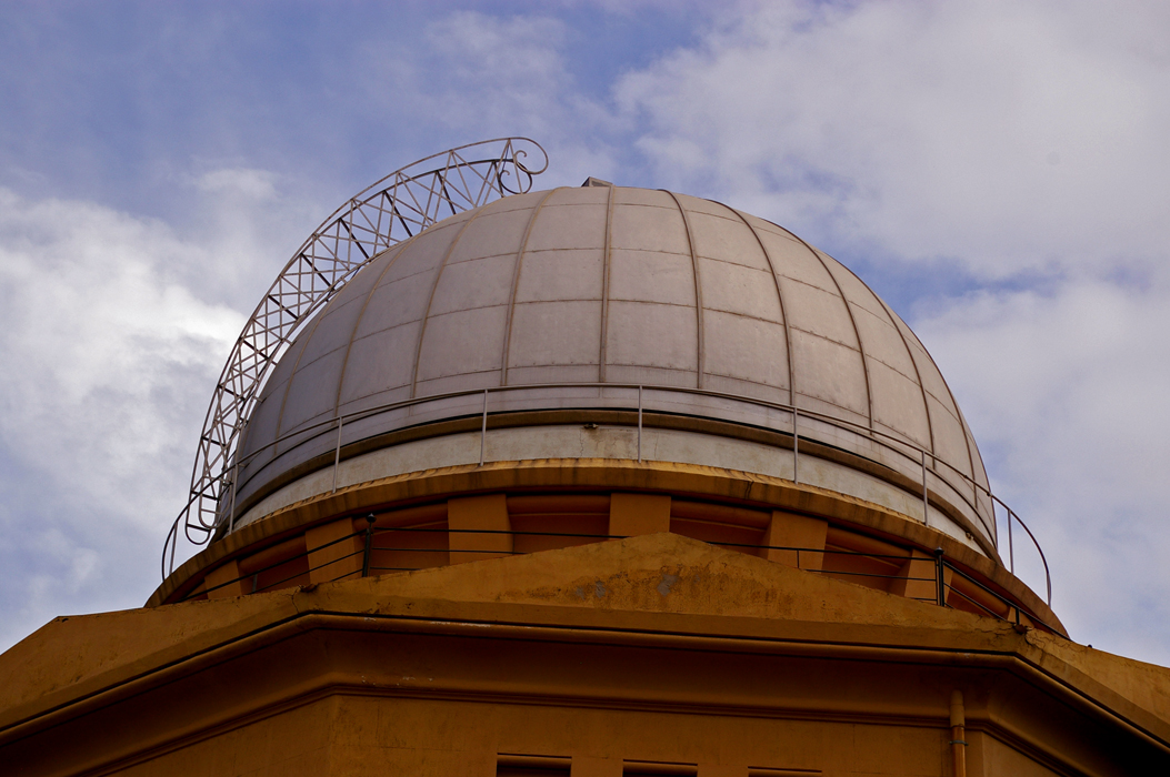 Observatori Fabra (Barcelona, Catalunya)